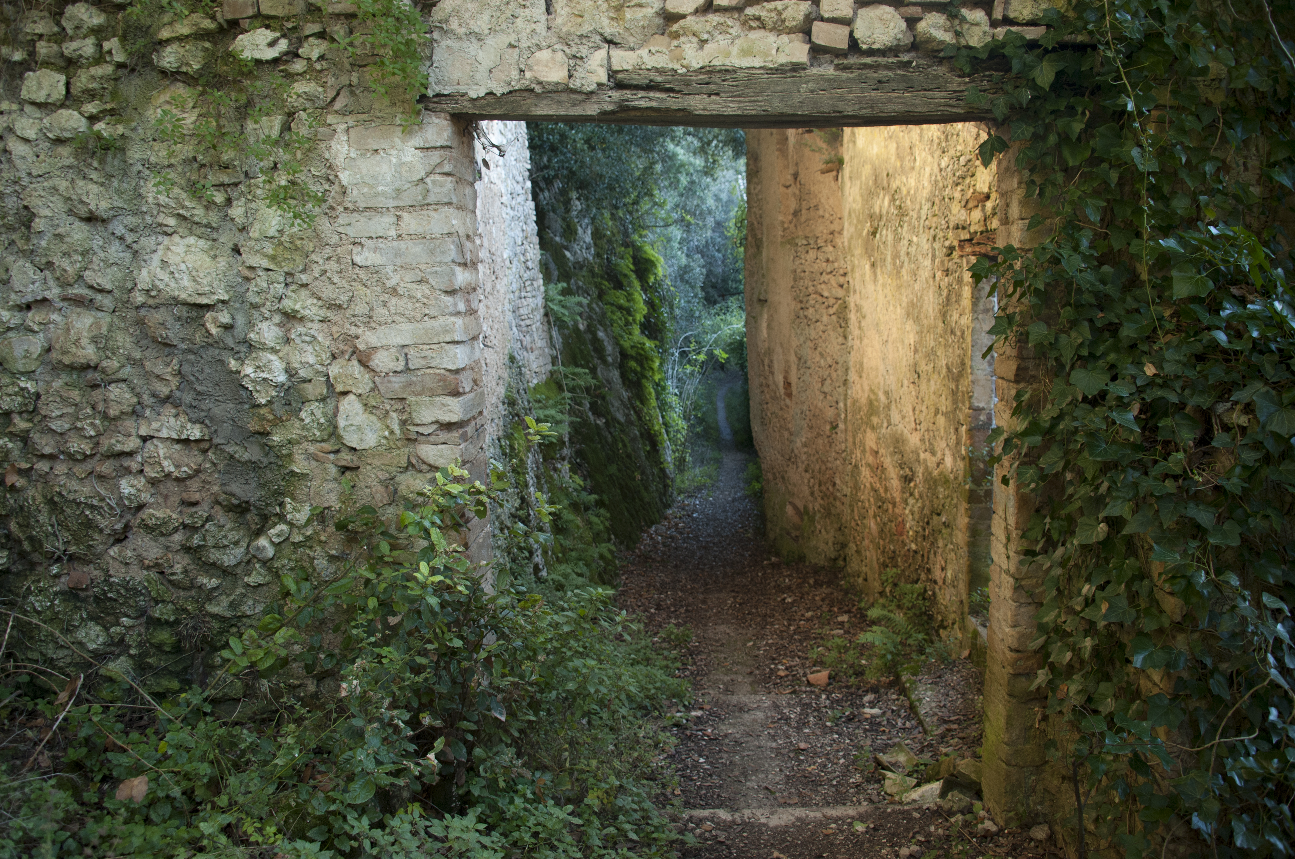 Uno dei luoghi più interessanti di Monteluco, purtroppo in stato di completo abbandono